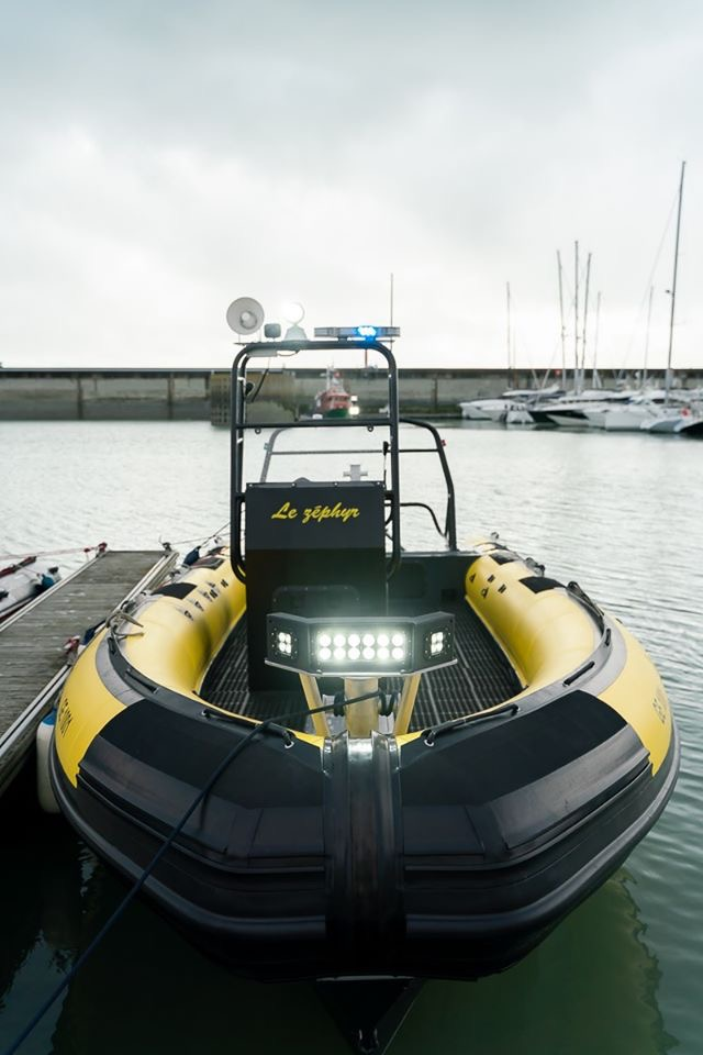 Nouvelle d’intervention rapide 310 du Sauvetage de Genève